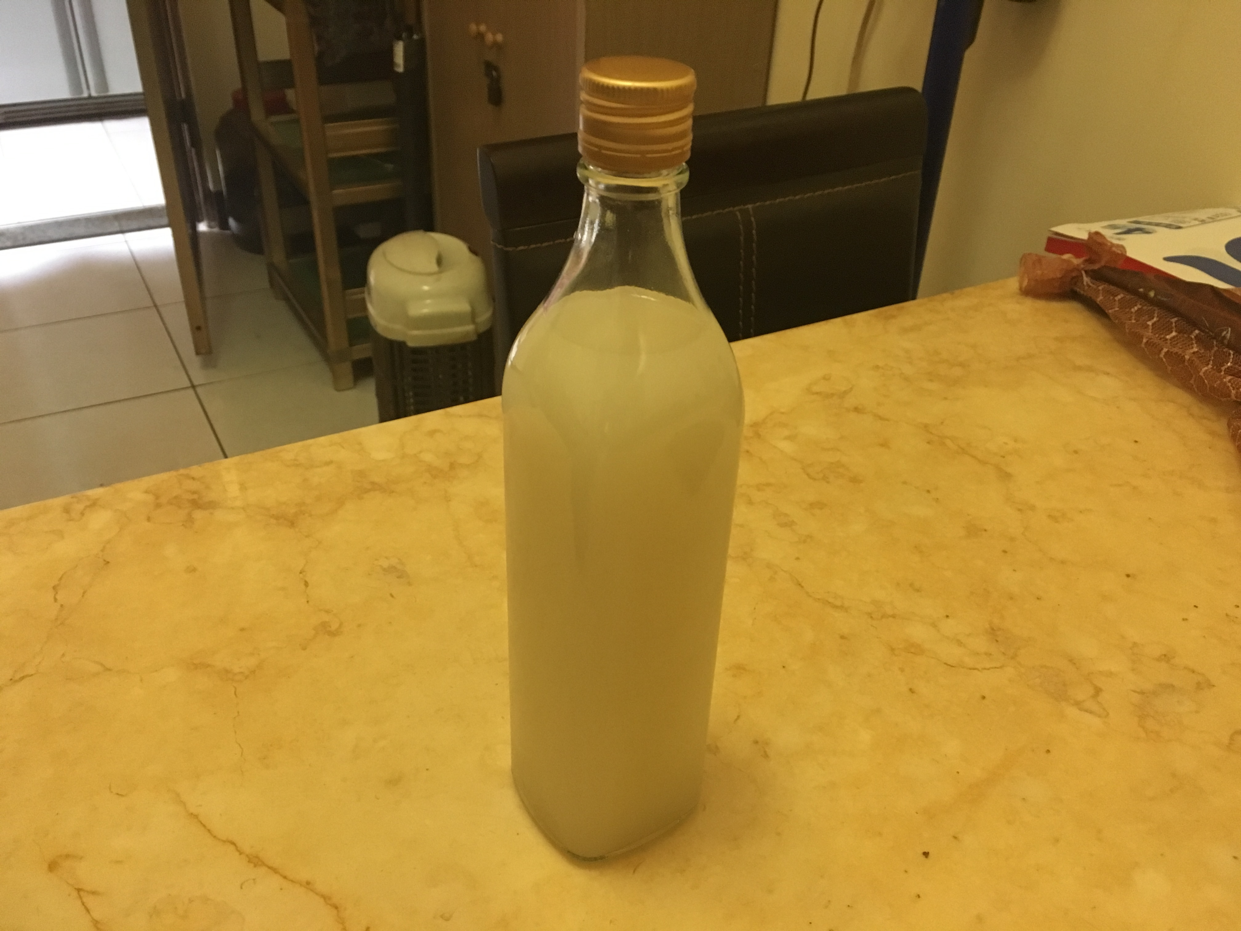 中文（台灣）: 臺灣糯米酒又叫山地酒，為臺灣原住民常見的酒類。